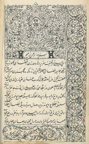 Məhəmməd Füzulinin Leyli ilə Məcnun əsəri